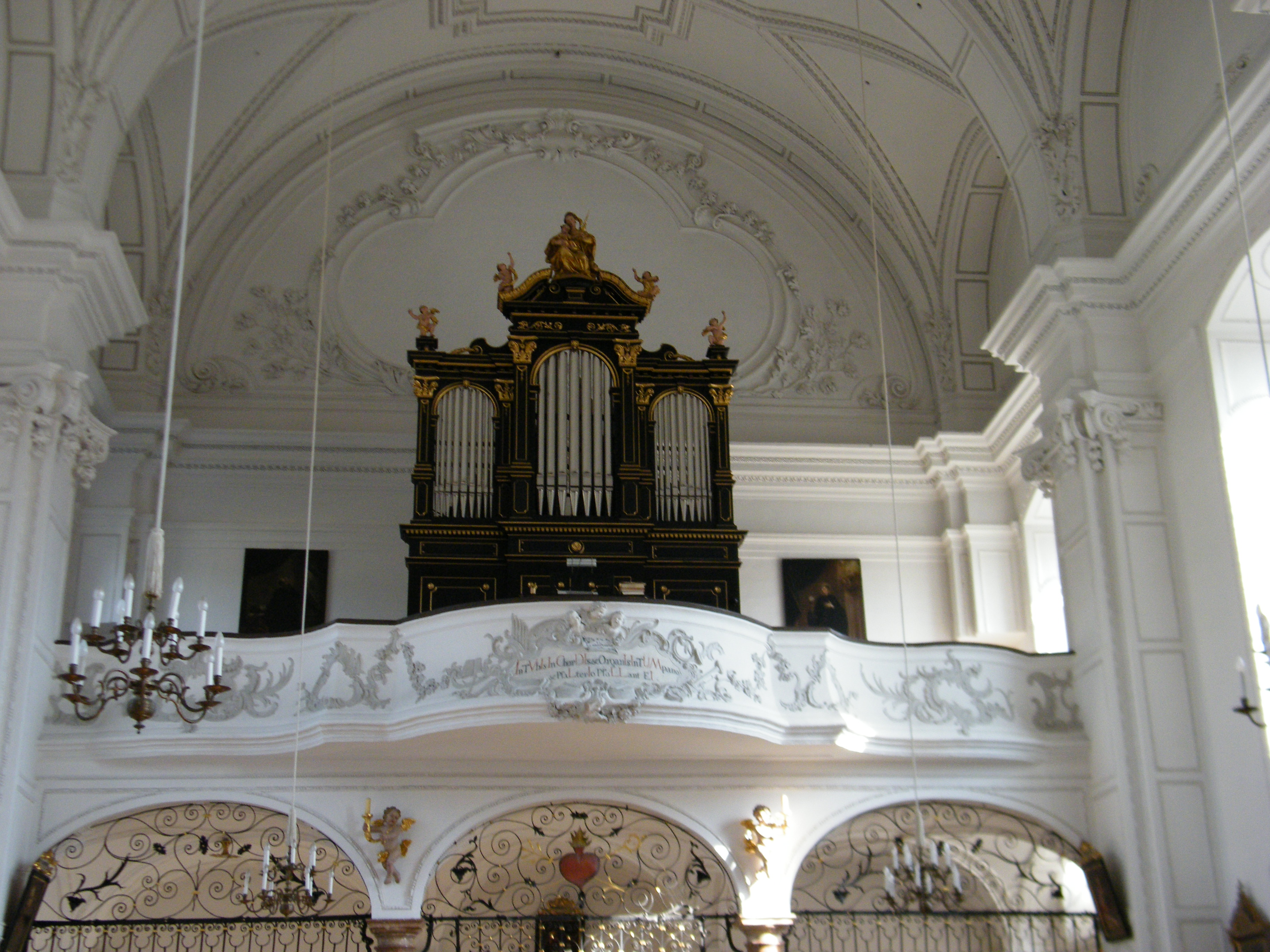 Steinmeyer Orgel Tittmoning